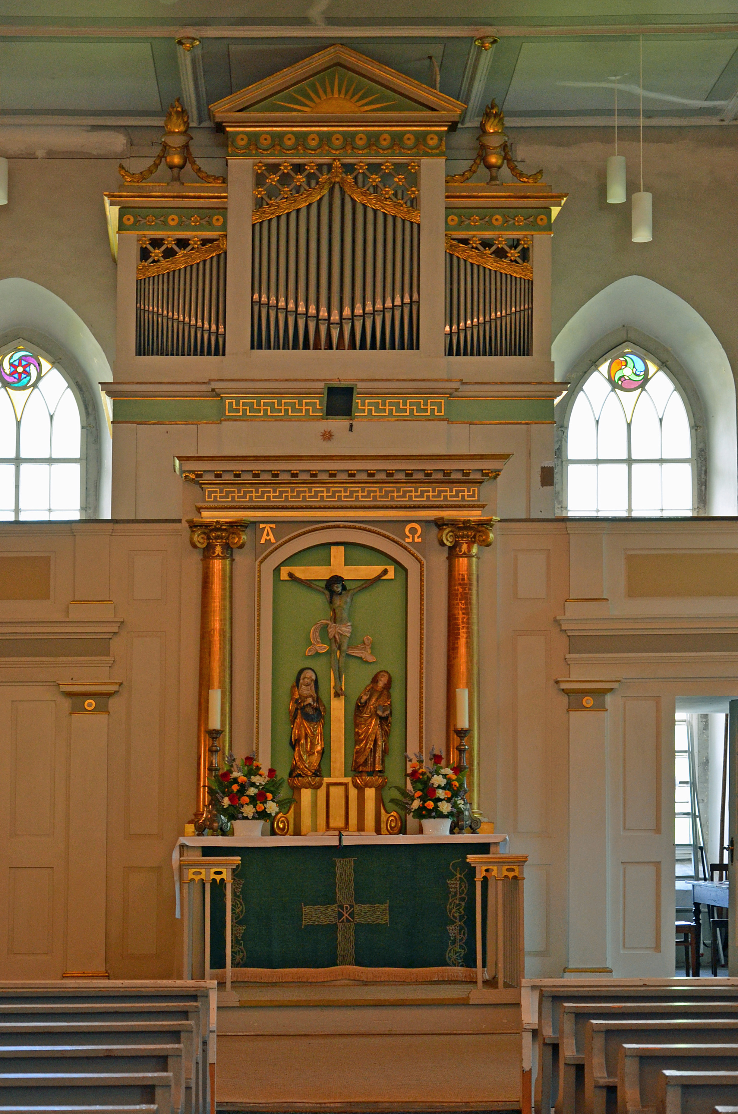 Der klassizistische Orgelprospekt von Johann Christian Kayser von 1806 in der Bergkirche Tharandt, darunter die Kreuzigungsgruppe um 1500 (Foto: Christoph Richter)